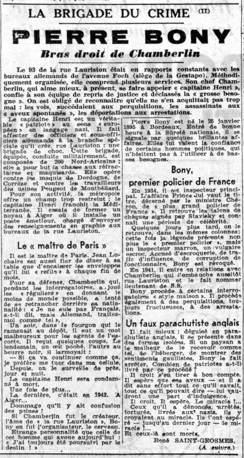 En 1944, le nom de Pierre Bonny devient inséparable de celui d'Henri Lafont (Chamberlin) et de la gestapo française de la rue Lauriston.